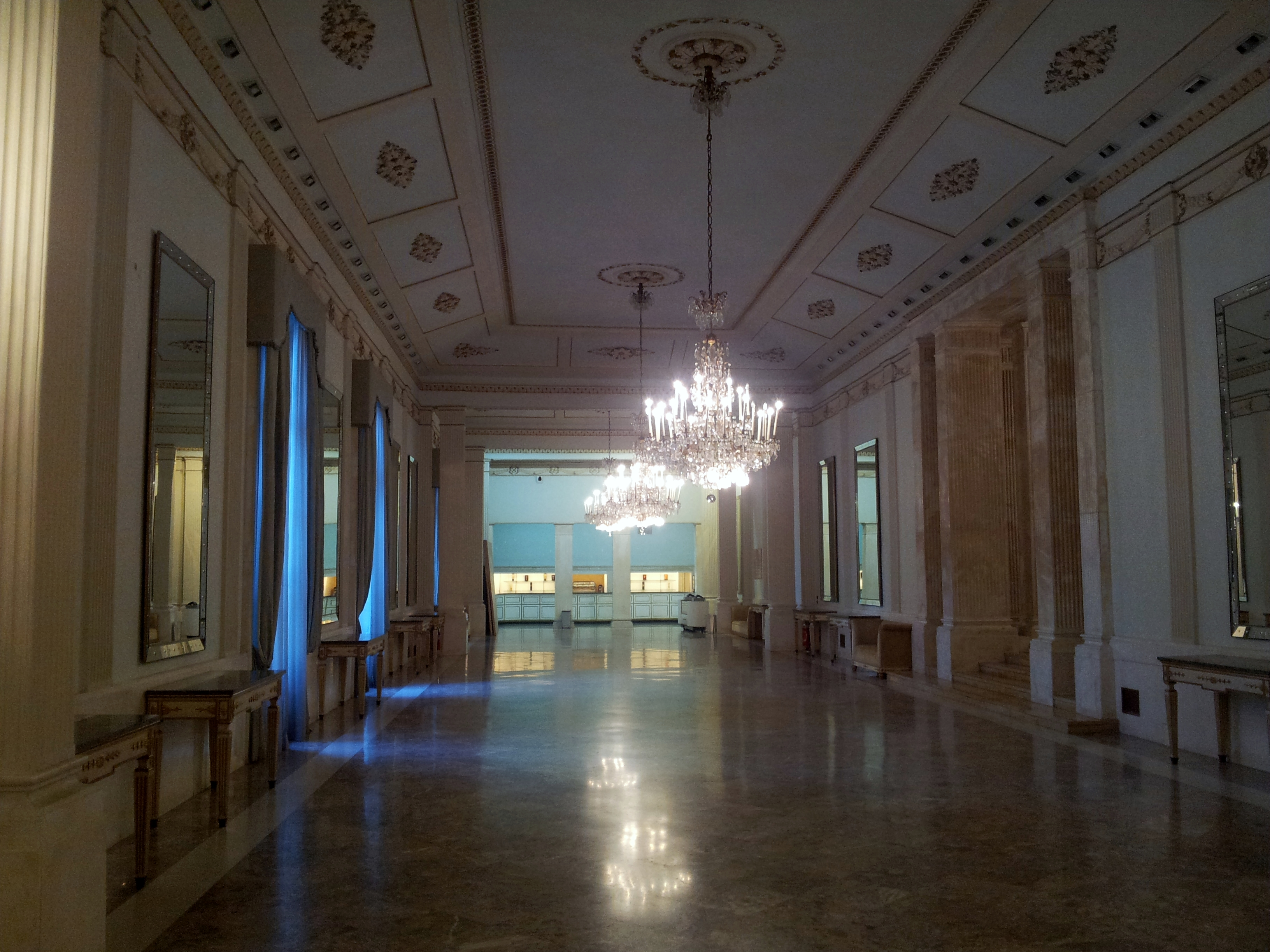 Il foyer del 1937 del Real Teatro di San Carlo (Napoli)